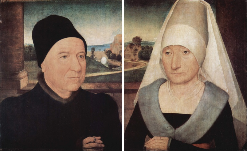 Portraits de deux personnes âgées, fusion à partir des fichiers existants.